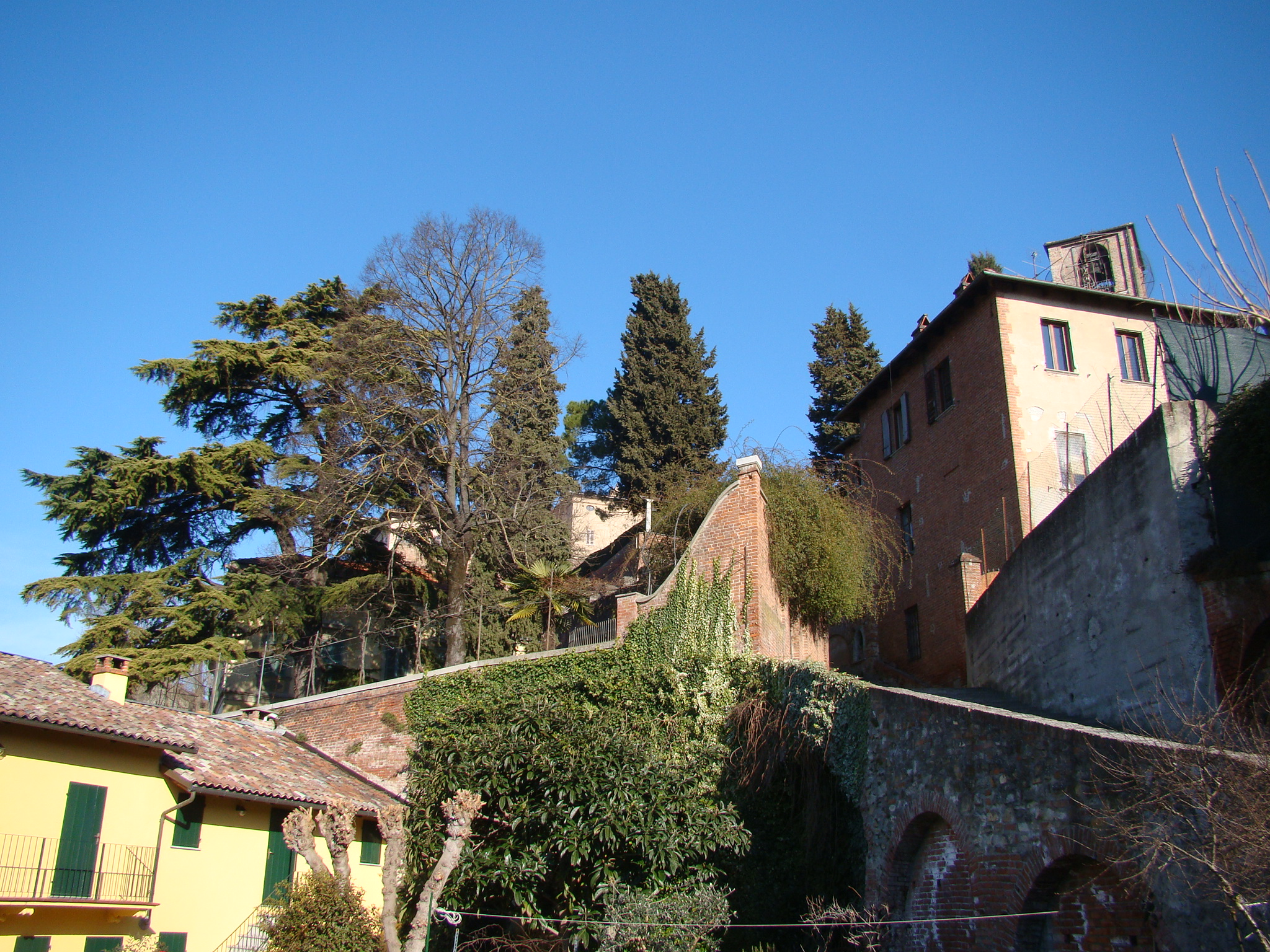 salendo da Via Battisti